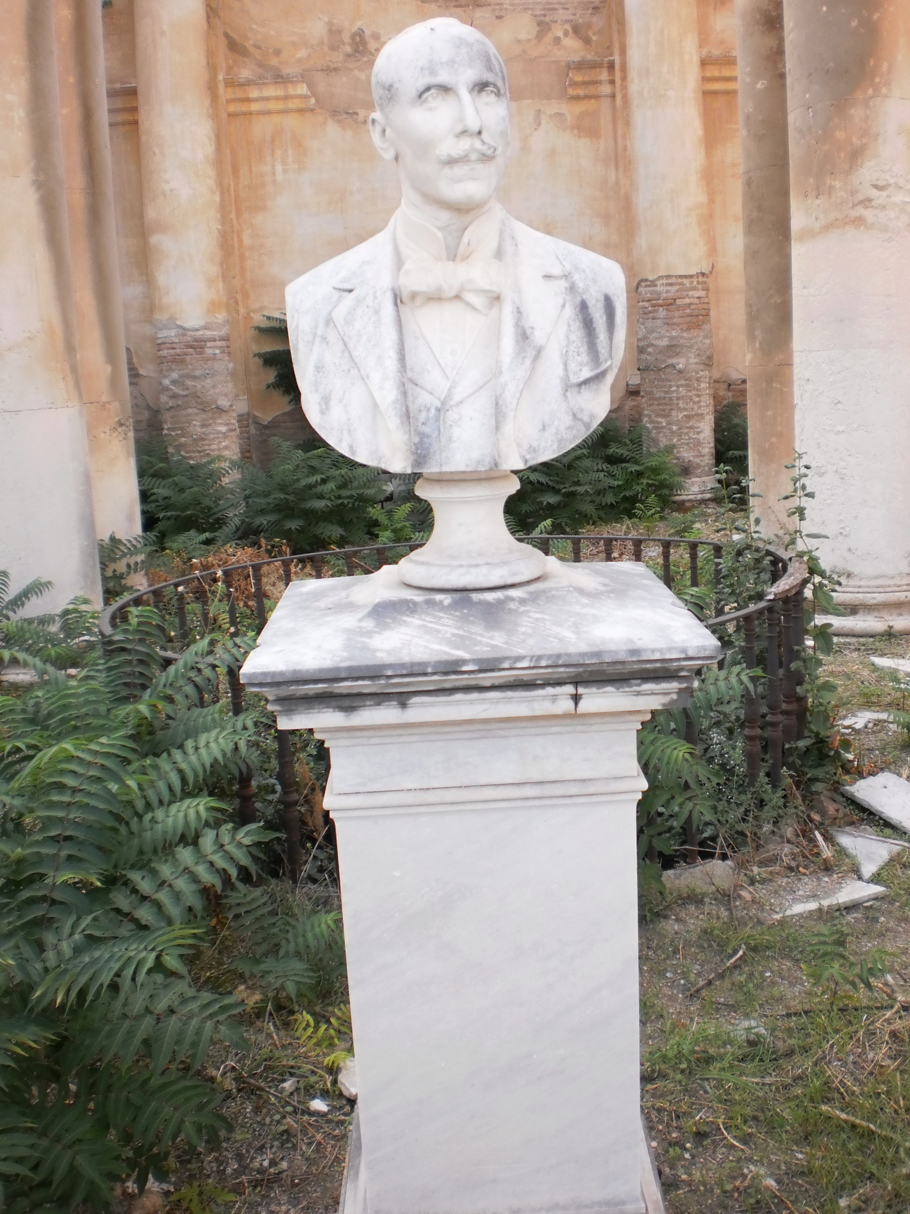 Busto di Giacomo Natoli